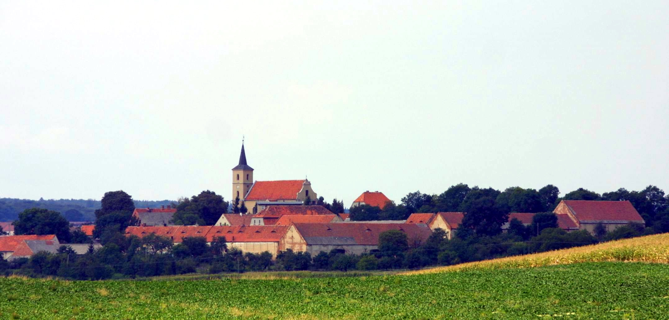 Krzelków